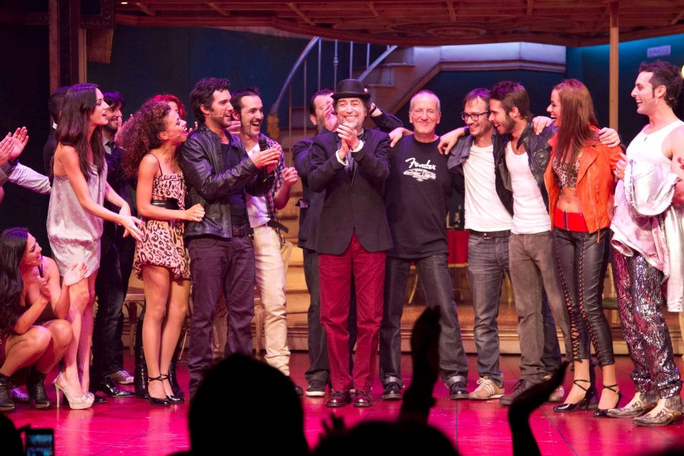 Sabina y Pancho Varona junto a todos el elenco en el estreno del Musical en Madrid